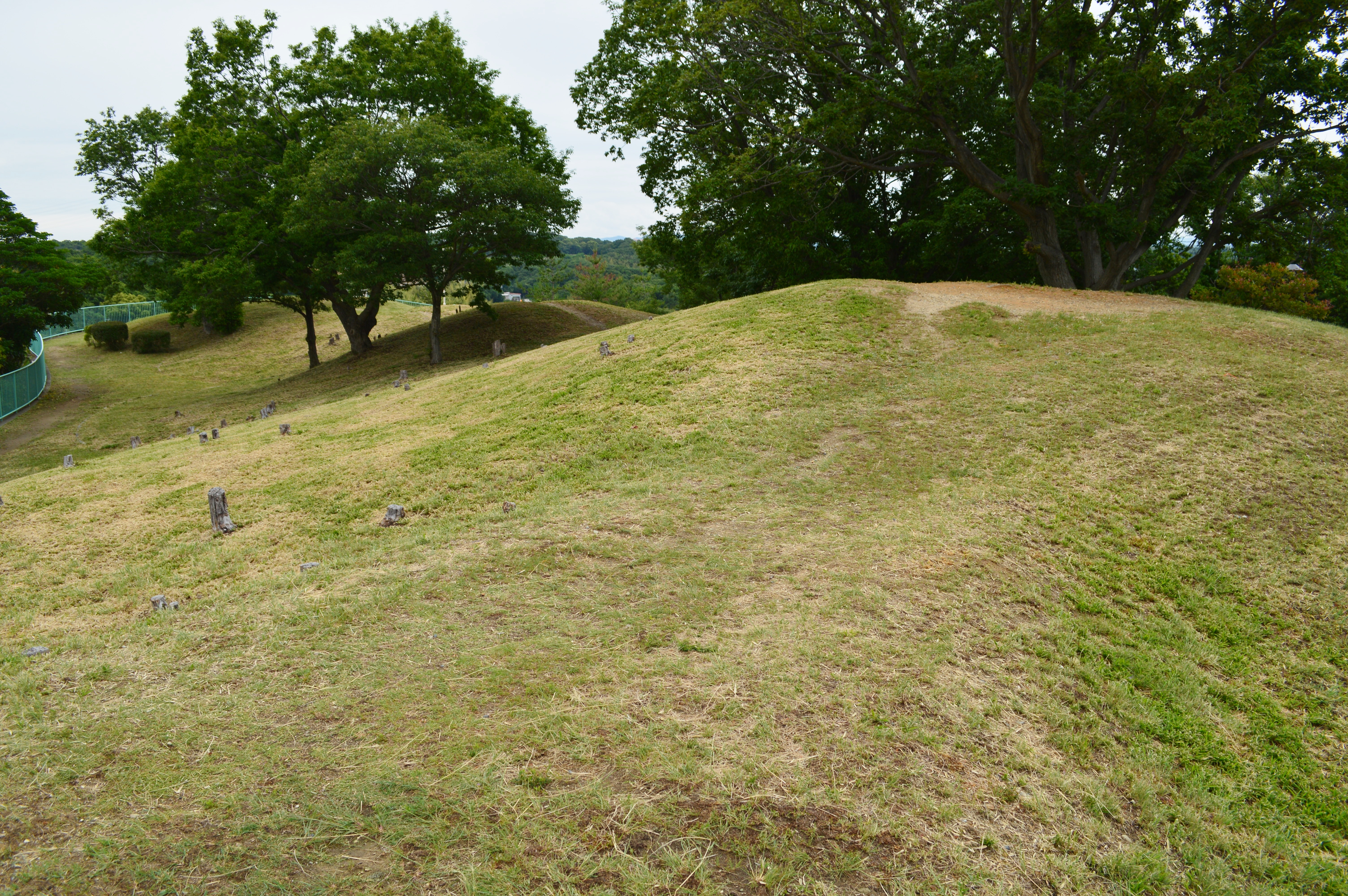 天王山古墳群 (神戸市) 概観